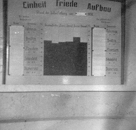 19. In den Nachkriegsjahren war es für die Bauern von größter Wichtigkeit, das staatlich vorgeschriebene Milch-Abgabesoll zu erfüllen. Diese Originaltafel zeigt die aktuelle Sollerfüllung von 5 Gemeinden im Jahre 1952.